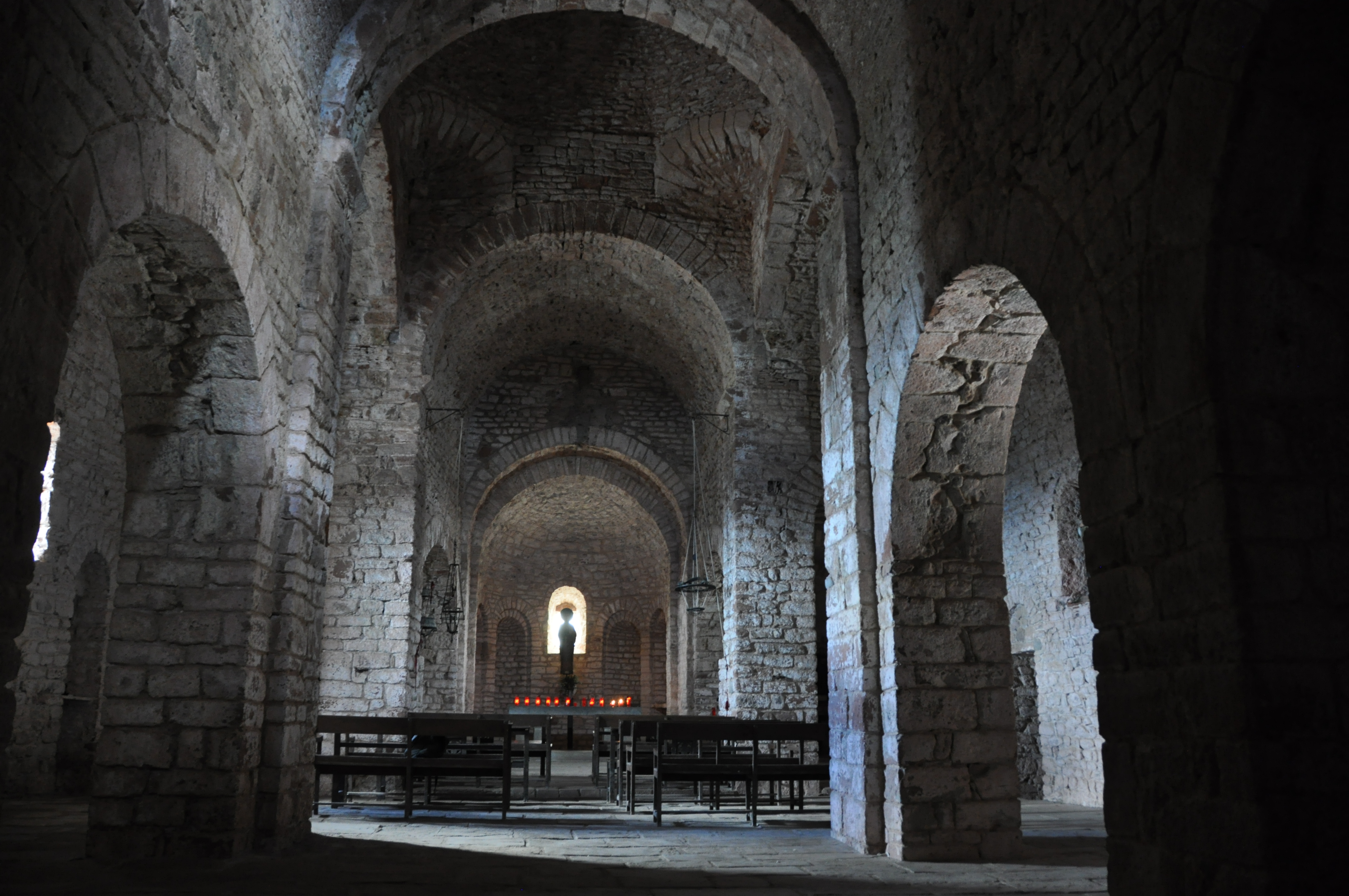 Sant Llorenç del Munt (Matadepera), església del monestir, nau central (consagrada el 1064)